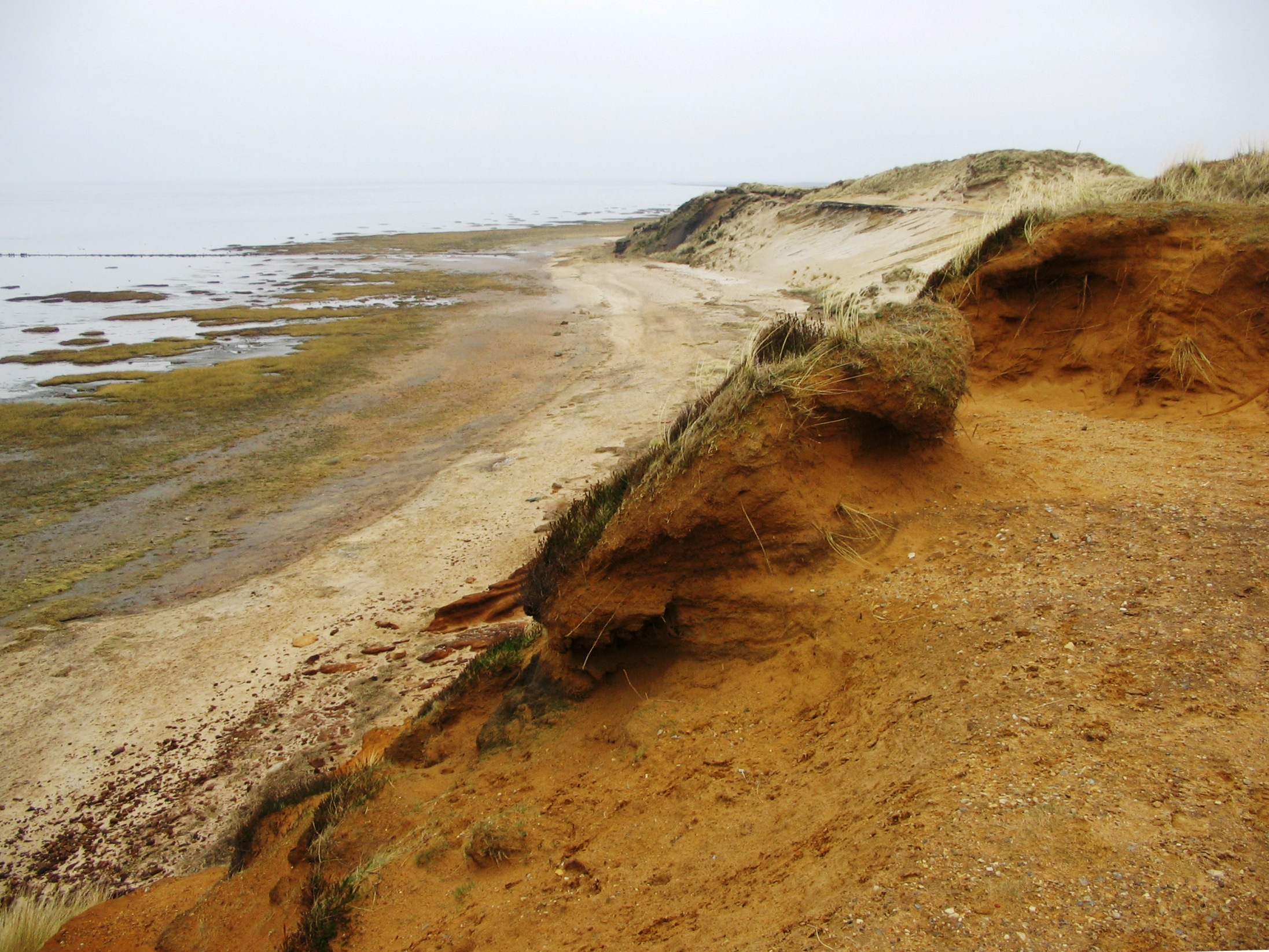 Der östliche Teil des Morsum-Kliffs auf Sylt